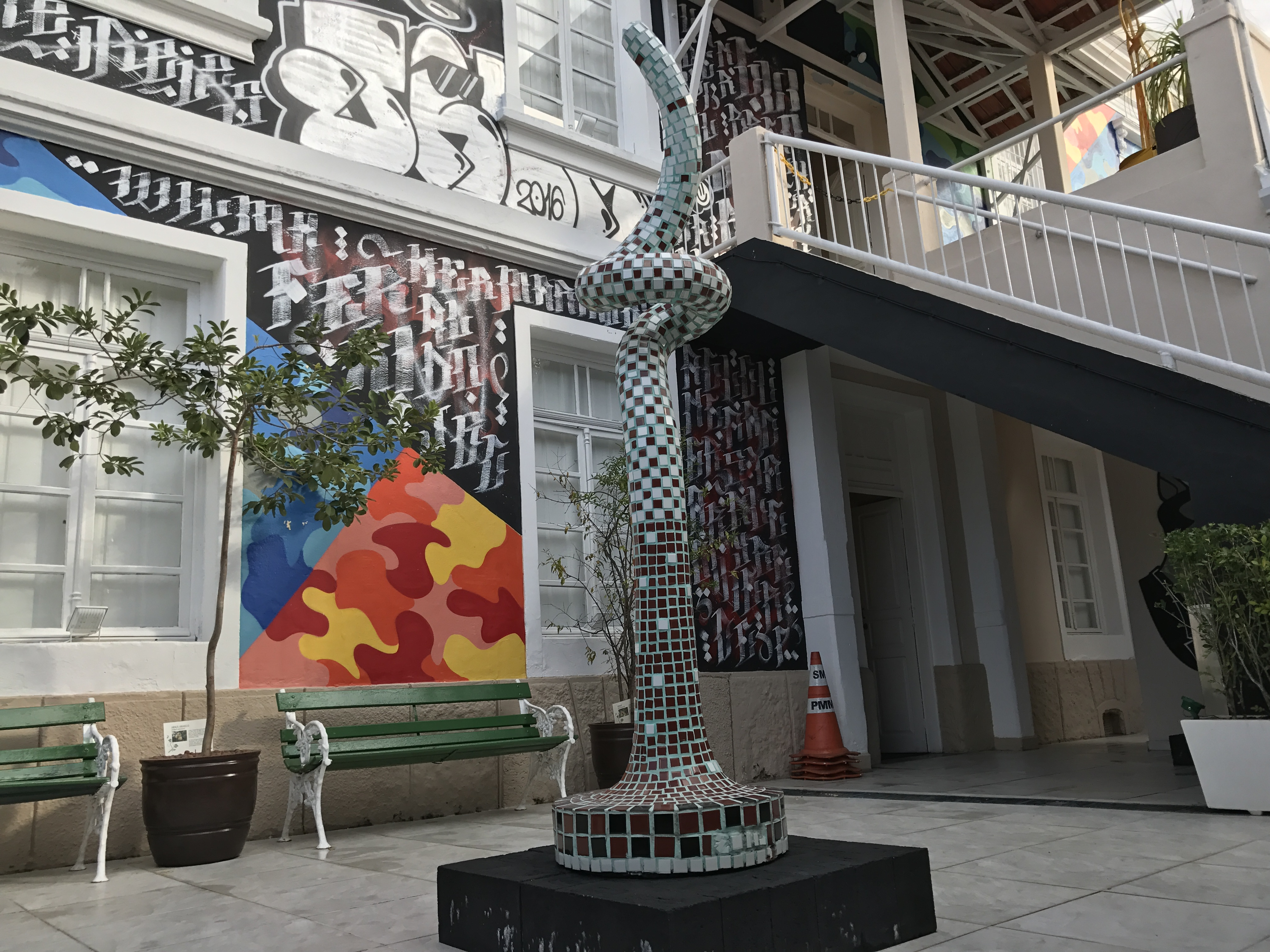 Detalhes sobre o grafite e ligação às outras salas da Pinacoteca através da escada.